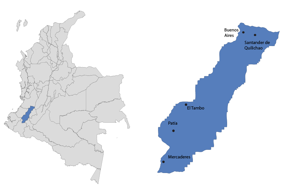 Eje musical de los Valles Interandinos del Pacífico